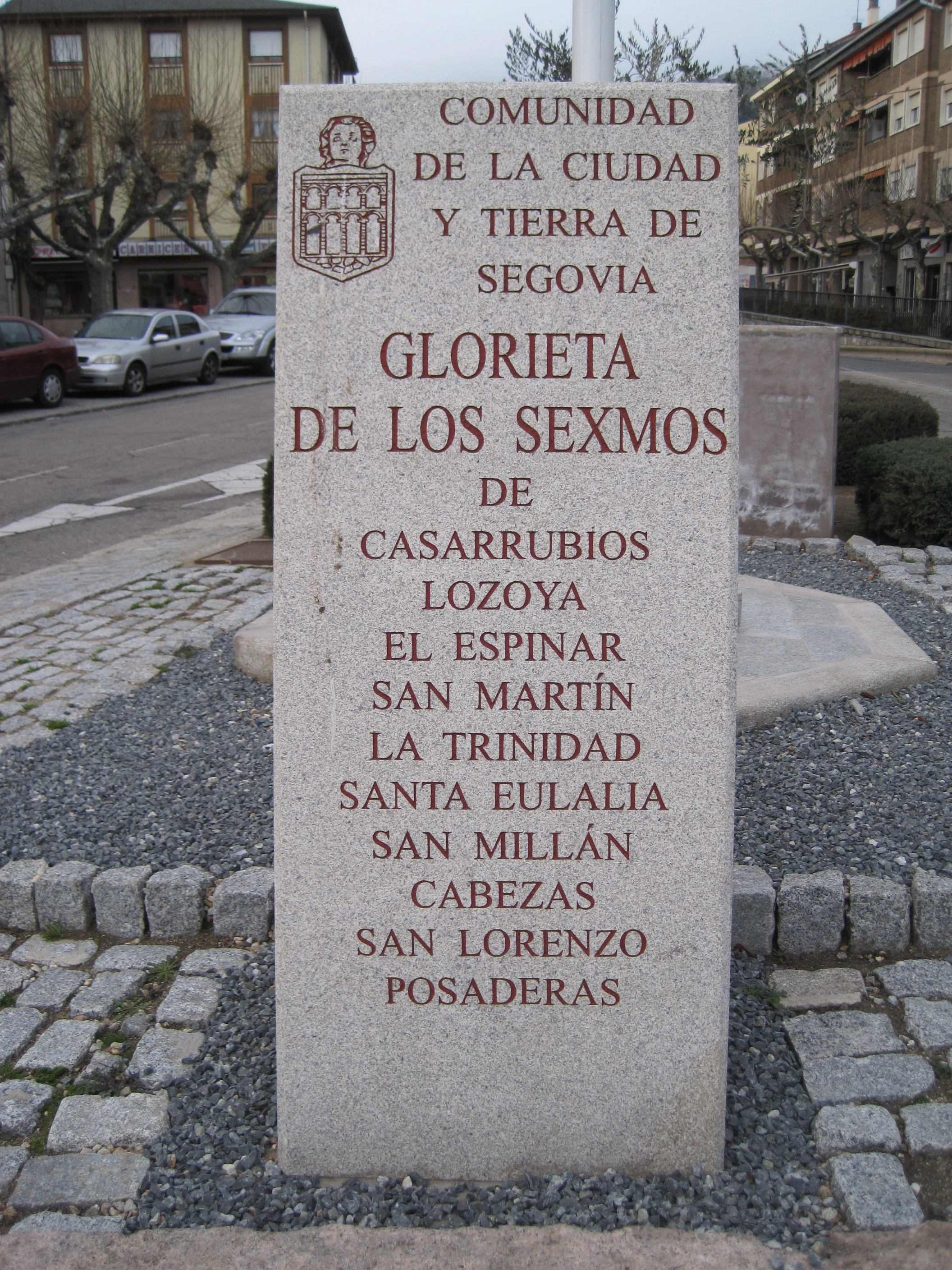 Monolito conmemorativo situado en la glorieta de los sexmos, en El Escorial (Madrid).